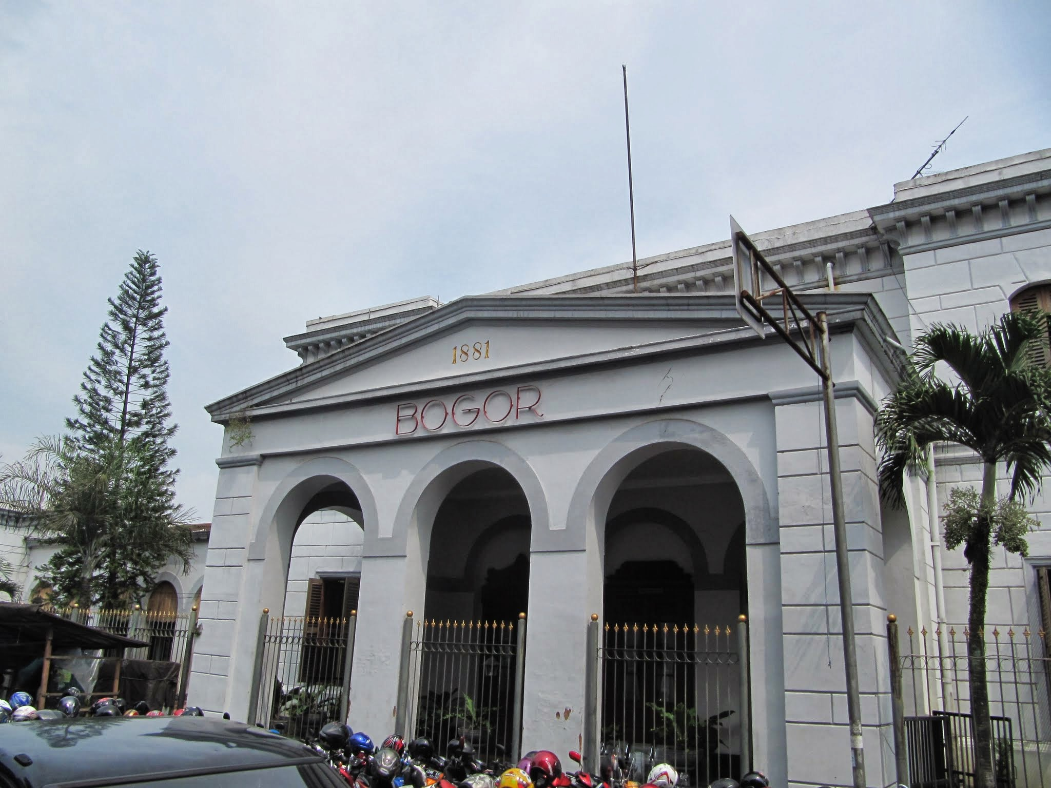 station